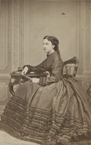 Княгиня Елизавета Дмитриевна Барятинская, урождённая княжна Джамбакур-Орбелиани (1835—1899)